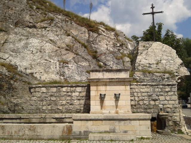 Fontana di San Rocco (o fontana degli Orsi)